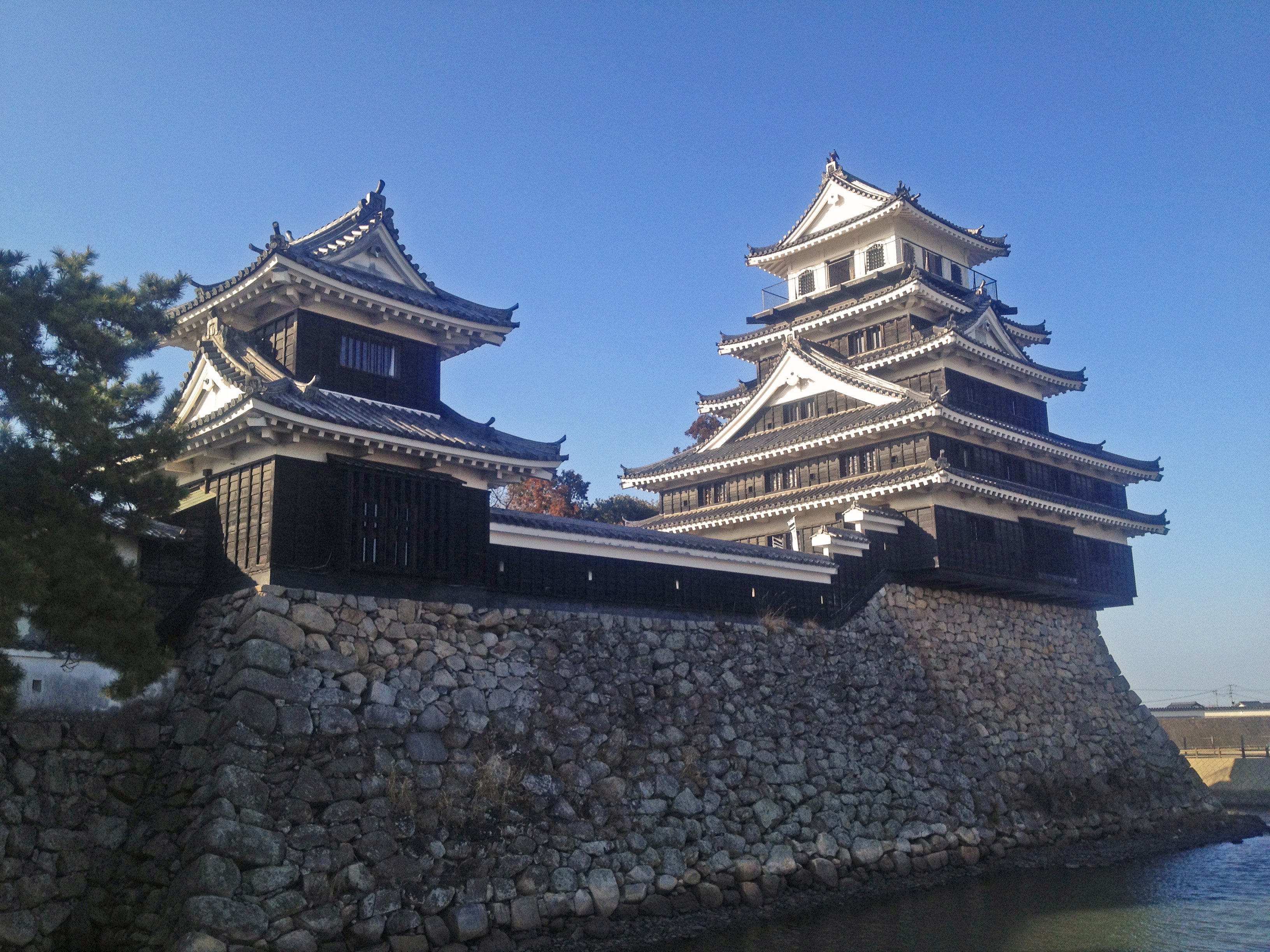 豊後国中津城本丸上段北東隅櫓跡に建つ模擬天守。